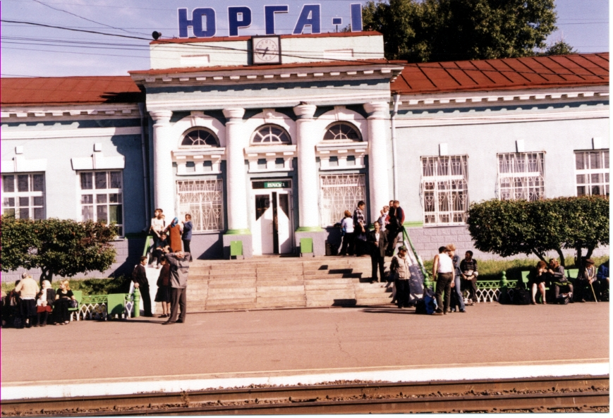 Юргинский Ж\Д Вокзал